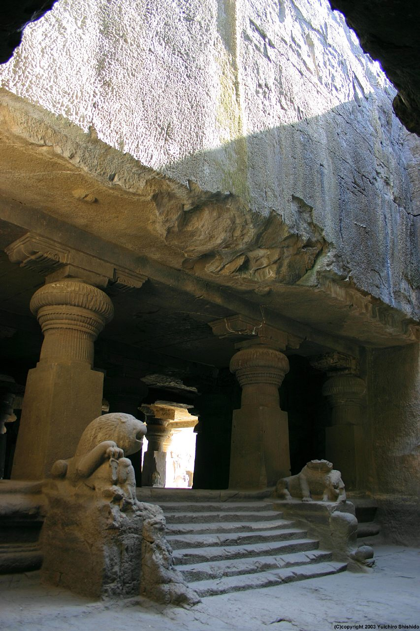 Ellora caves. Cave 29. Dhumar Lena. A Hindu temple.